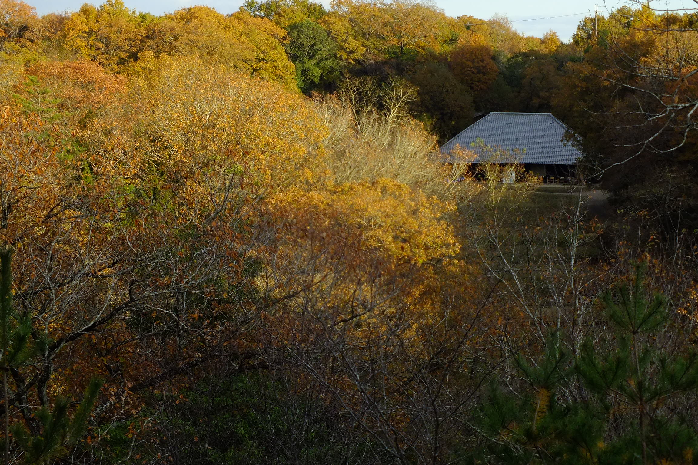 2016-11-25 Yashiro forest park,やしろの森公園 母屋 尾根の東屋より